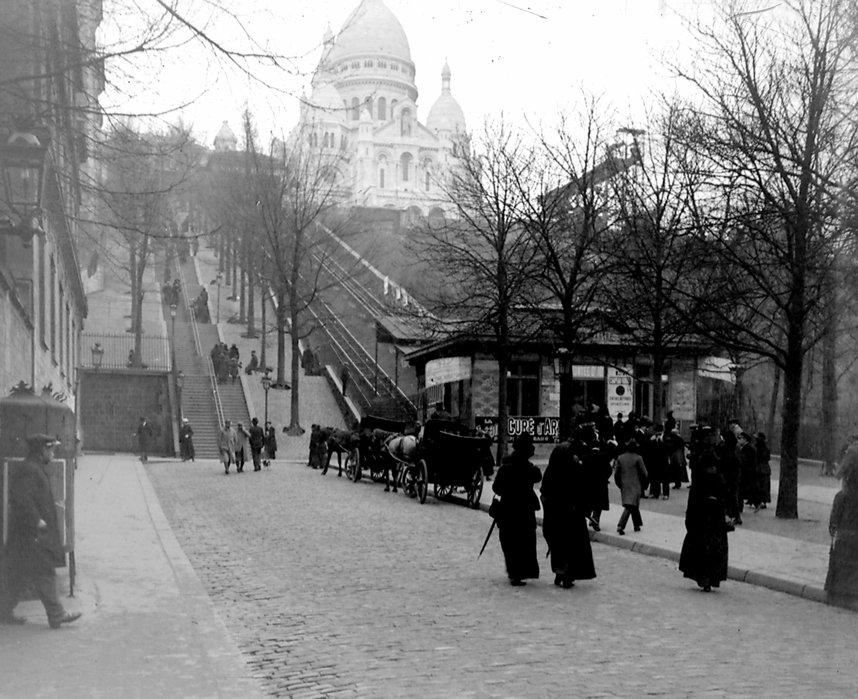 Paris Funiculaire de Montmartre. Photo prise par mon grand-père Maurice Terrien en 14-18